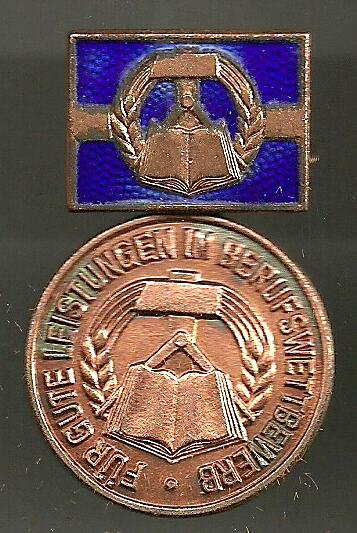 Für gute Leistungen im Berufswettbewerb - neue Form